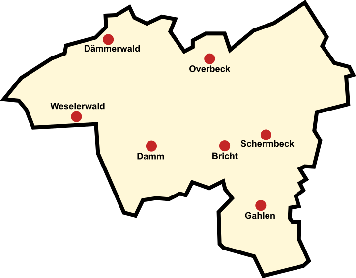 Ortsteile von Schermbeck